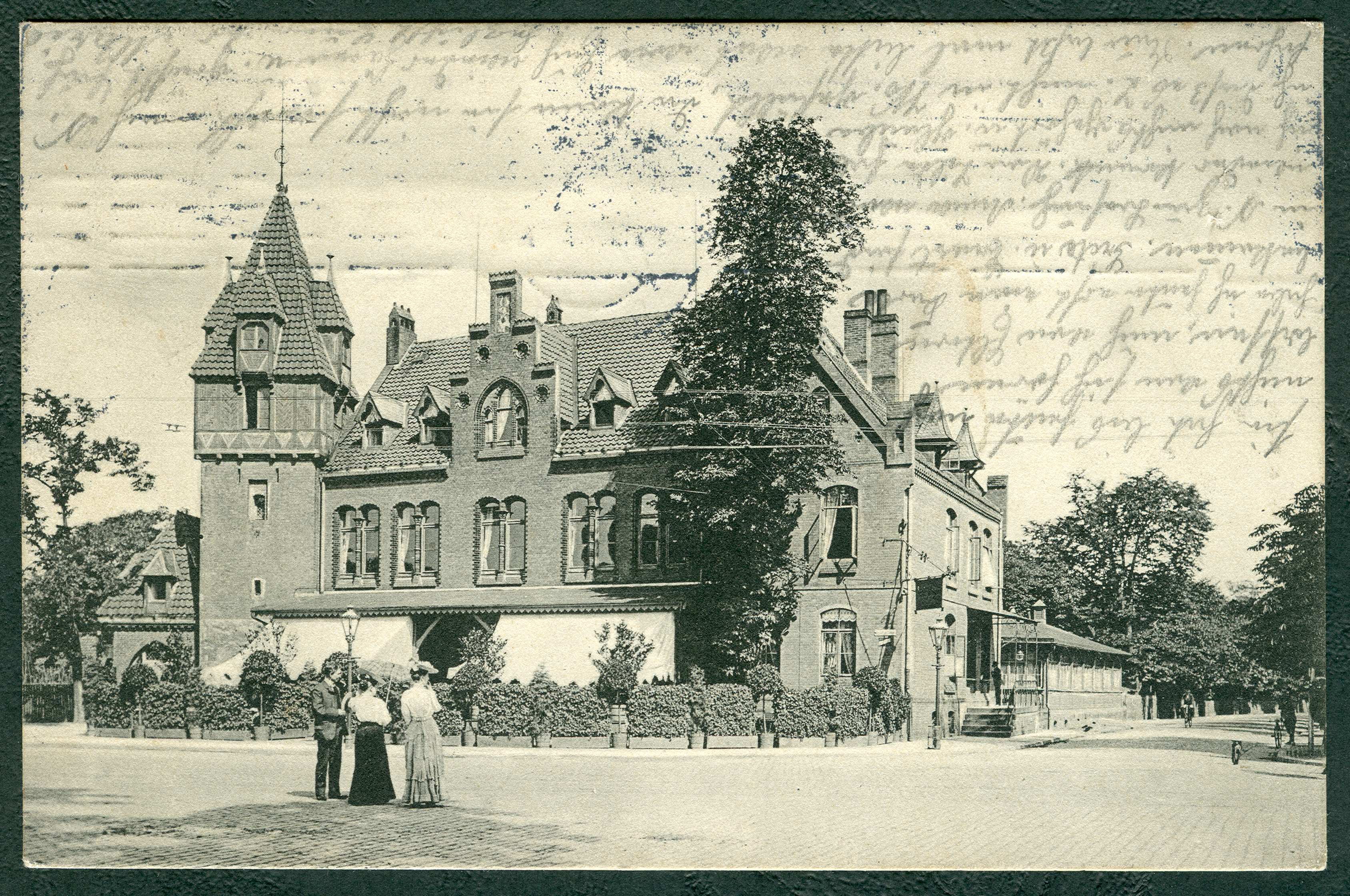 Bildmotiv der Ansichtspostkarte von Karl Friedrich Wunder